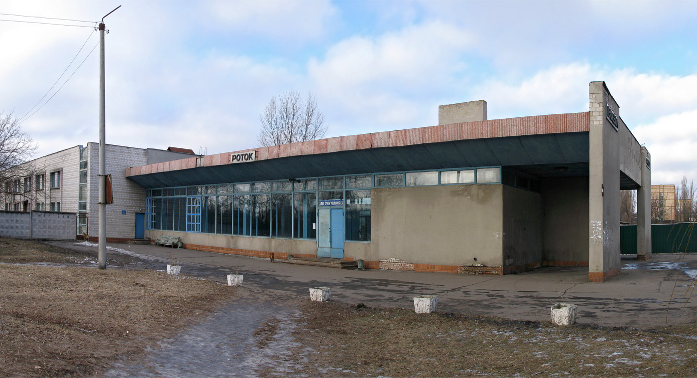 Вокзал ст. Роток